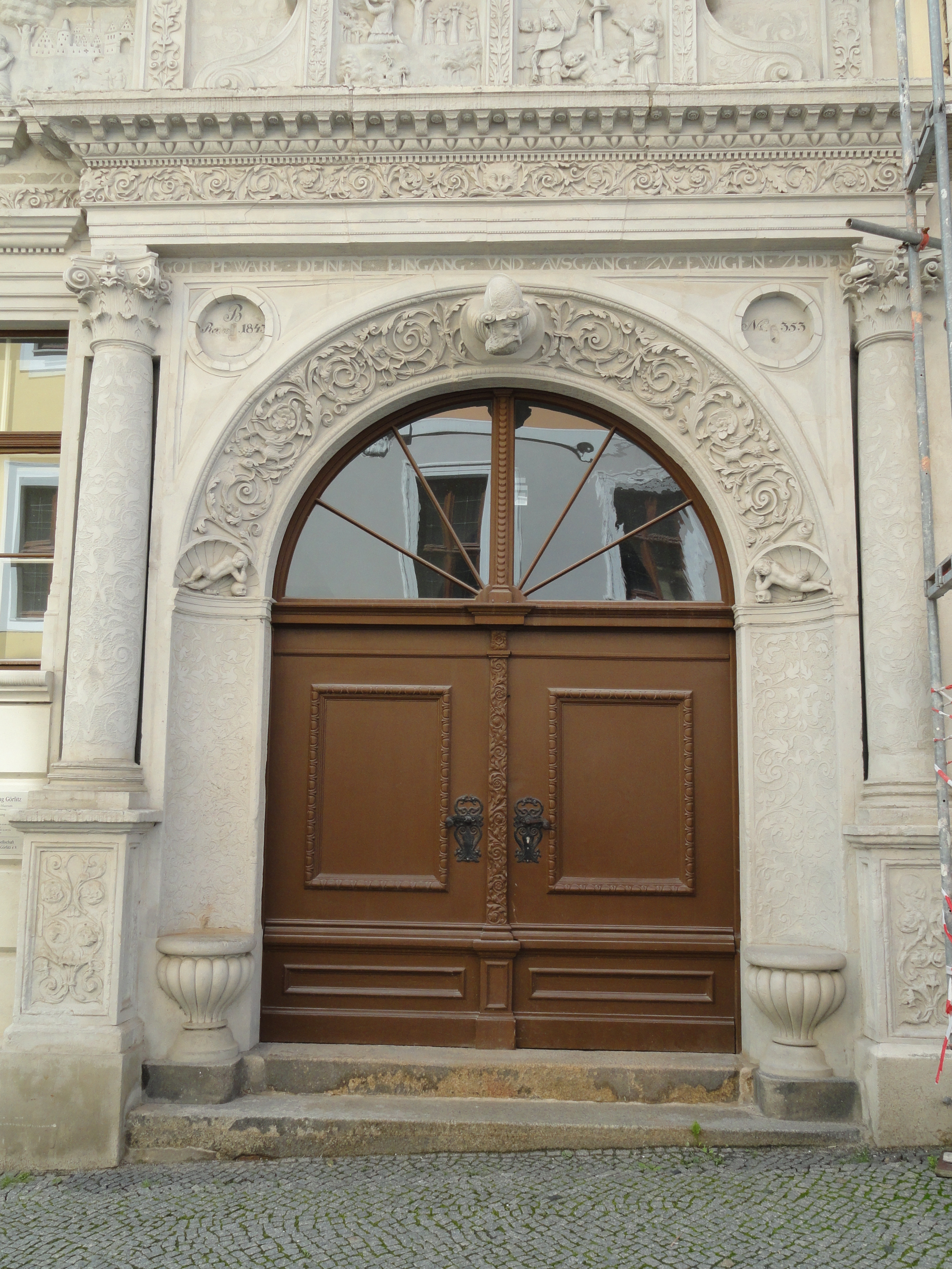 Portal des Biblischen Hauses, Neißstraße 29, Görlitz